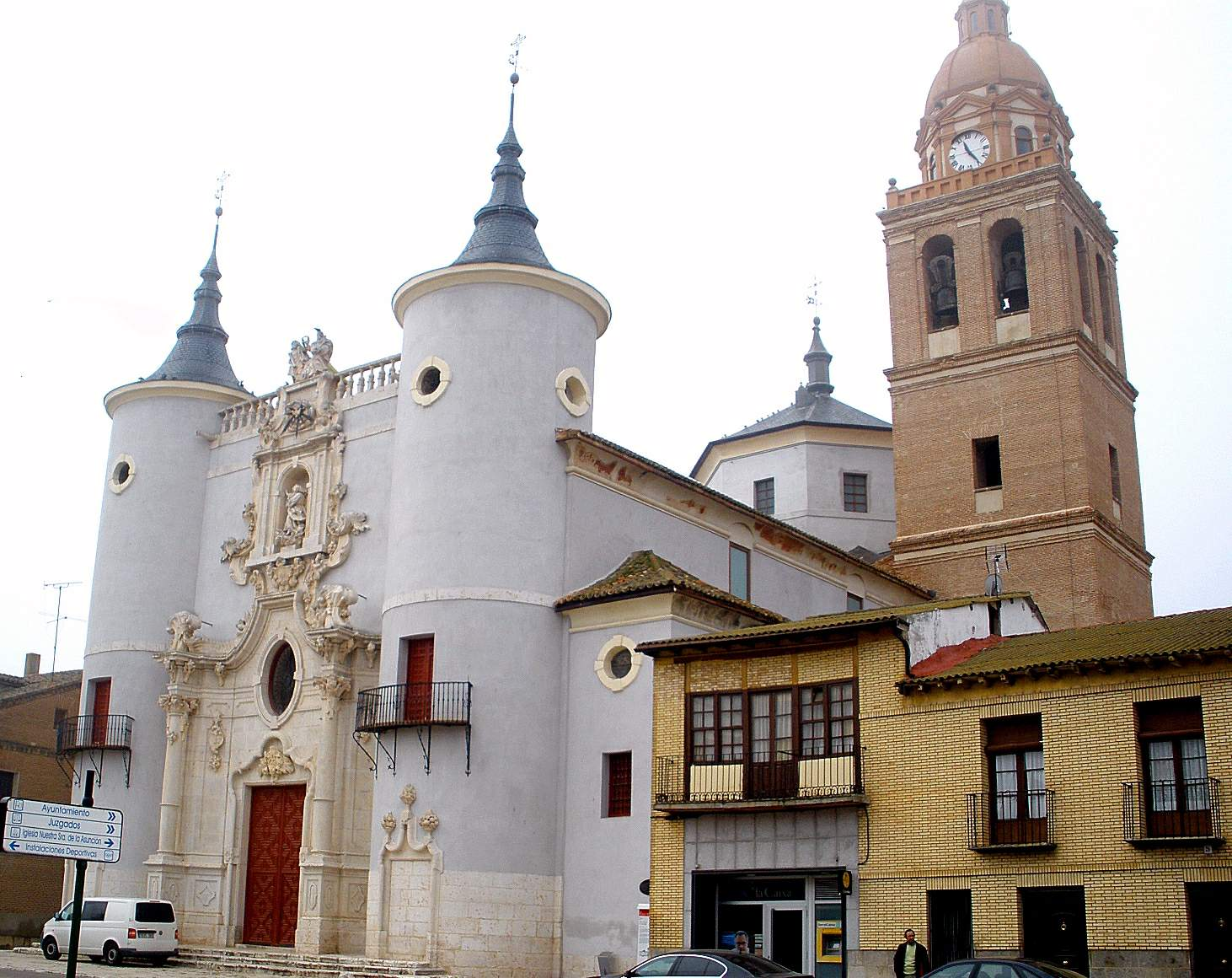 Church of Nuestra Señora de la Asunción, Rueda (Valladolid)